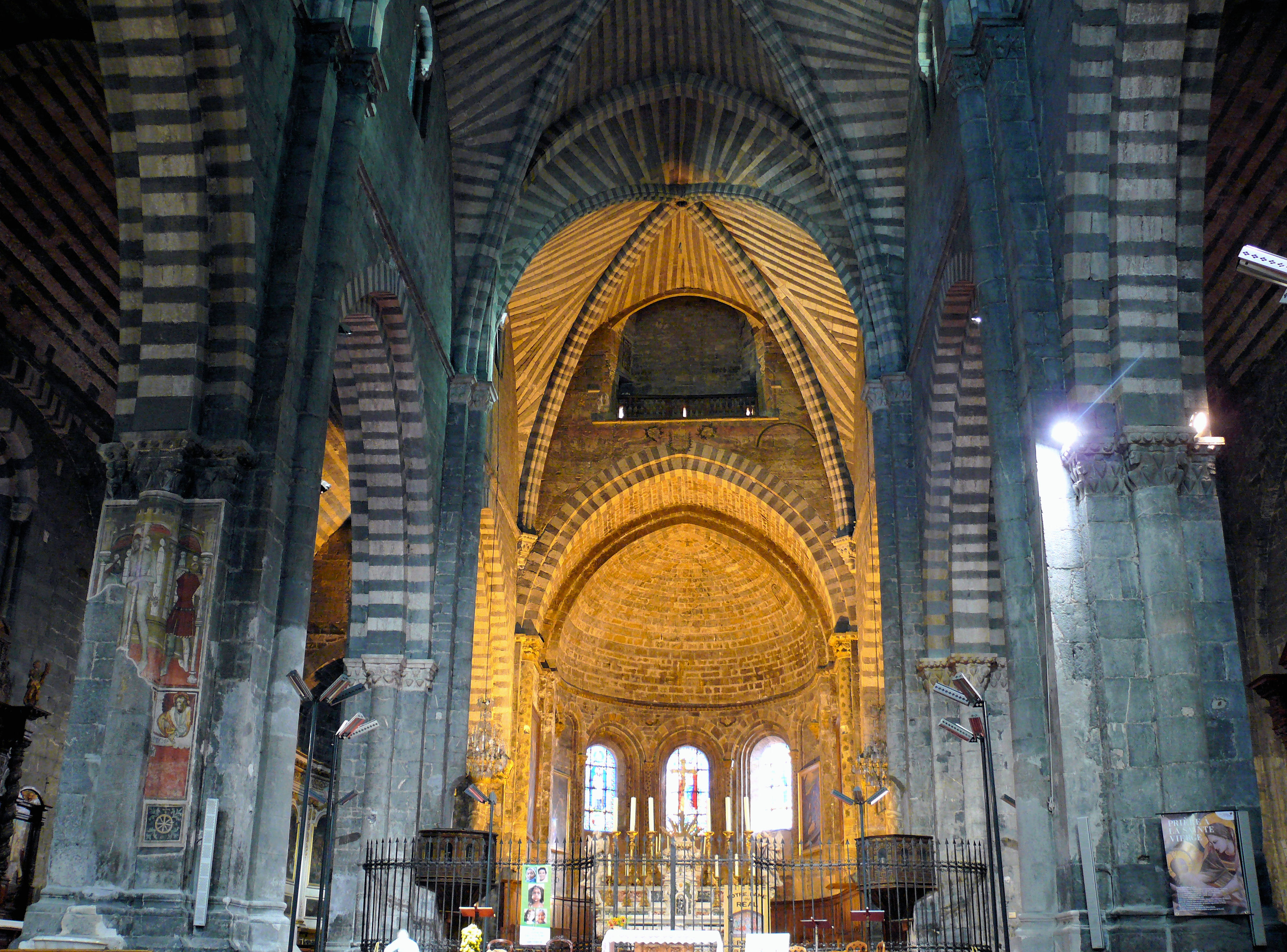 Embrun - Cathédrale Notre-Dame du Réal - Nef centrale